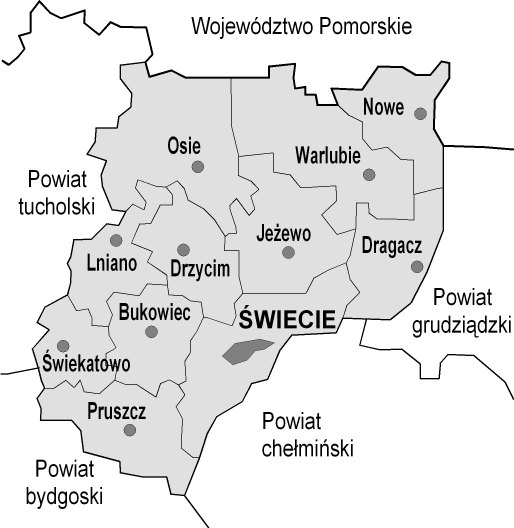 Powiat świecki - mapa gmin